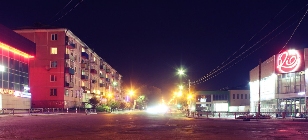 ул некрасова